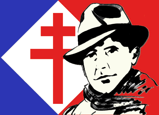 Proposition de logo de la Résistance française (Jean Moulin et Croix de Lorraine).